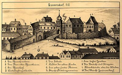 Kupferstich: Der Niederöstereichische Ort Gaunersdorf (heute Gemeinde Gaweinstal im 17. Jhdt.